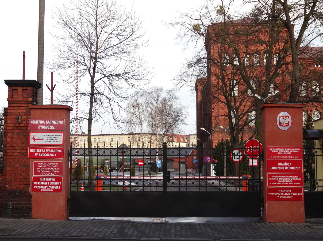 Kompleks wojskowy (dawne koszary, komenda garnizonu itp.) zawarty między ulicami: Zygmunta Augusta, Sowińskiego, Sobieskiego i Warszawską w Bydgoszczy